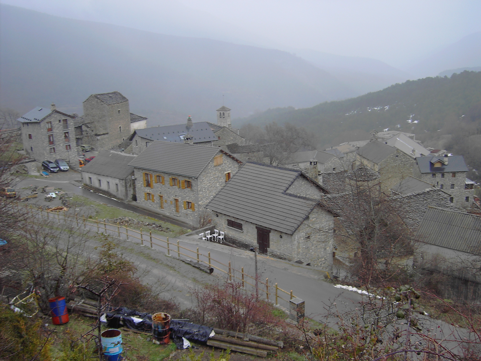 Vista general de Fanlo, capital del municipio homónimo en la comarca oscense de Sobrarbe. Actualmente ejerce de cabecera poblacional y administrativa del Valle de Vió, con fuerte vinculación al Parque Nacional de Ordesa y Monte Perdido por su proximidad.